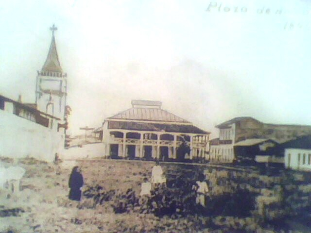 Fotografía que muestra el terreno antes de la Plaza de Armas, con la Casa de Fierro dominado el plano de fondo, en el centro. La imagen fue reducida a una calidad permisiva para poder visualizarla.